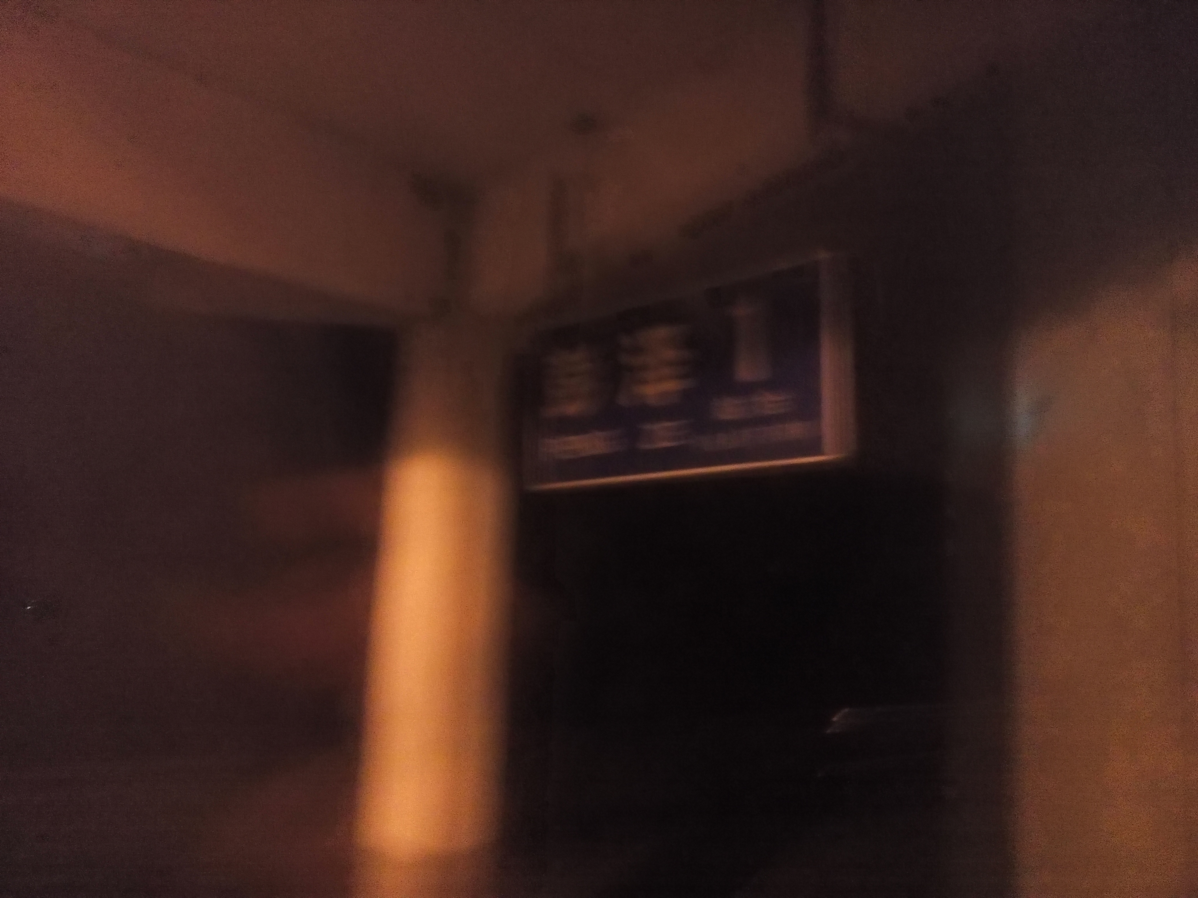 彭泽站。。